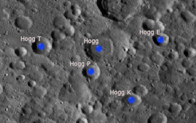 Cráter lunar Hogg. Cráteres satélite. (Imagen LRO)